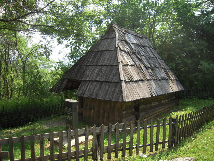 Rodna_kuća_Petra_Kočića